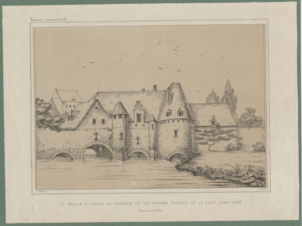 Dit is een gekleurde gravure naar Piots tekening (LP/119), bestemd om Van Evens Louvain Monumental te illustreren ...